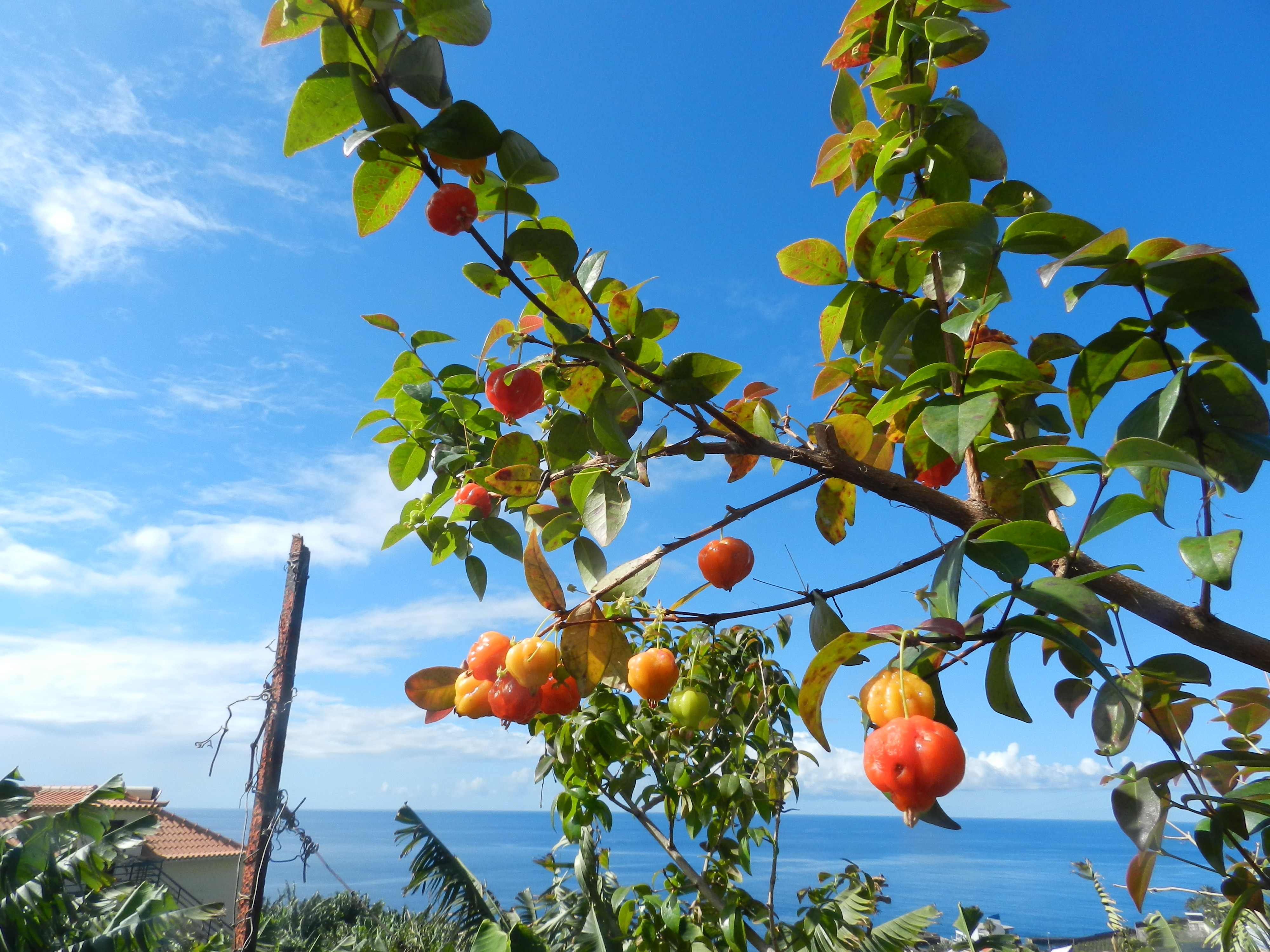 Pitangueira, Lugar de Baixo, moradia do Mestre Augusto (03/28/2020, autor: Higino Faria)